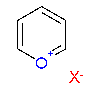 Pyrylium salt